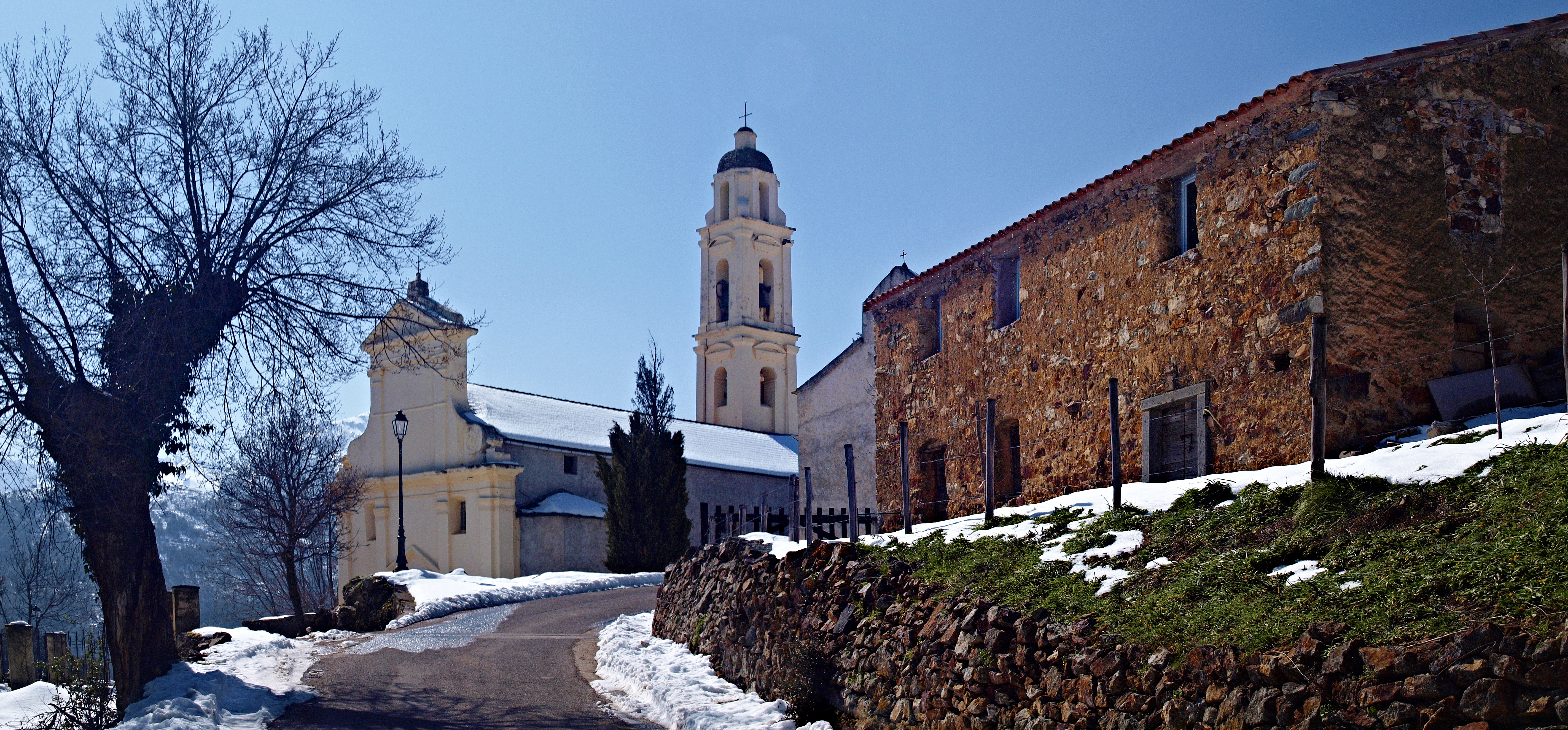 Olmi-Cappella (Corsica) - Église Saint-Nicolas et la chapelle de confrérie